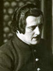 Lehotay Árpád (1896–1953) színész, rendező, színházigazgató, egyetemi tanár.